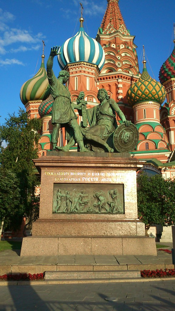 Московский Кремль (Москва и Московская область, Москва, Красная площадь, Кремлевская наб., Александровский сад)